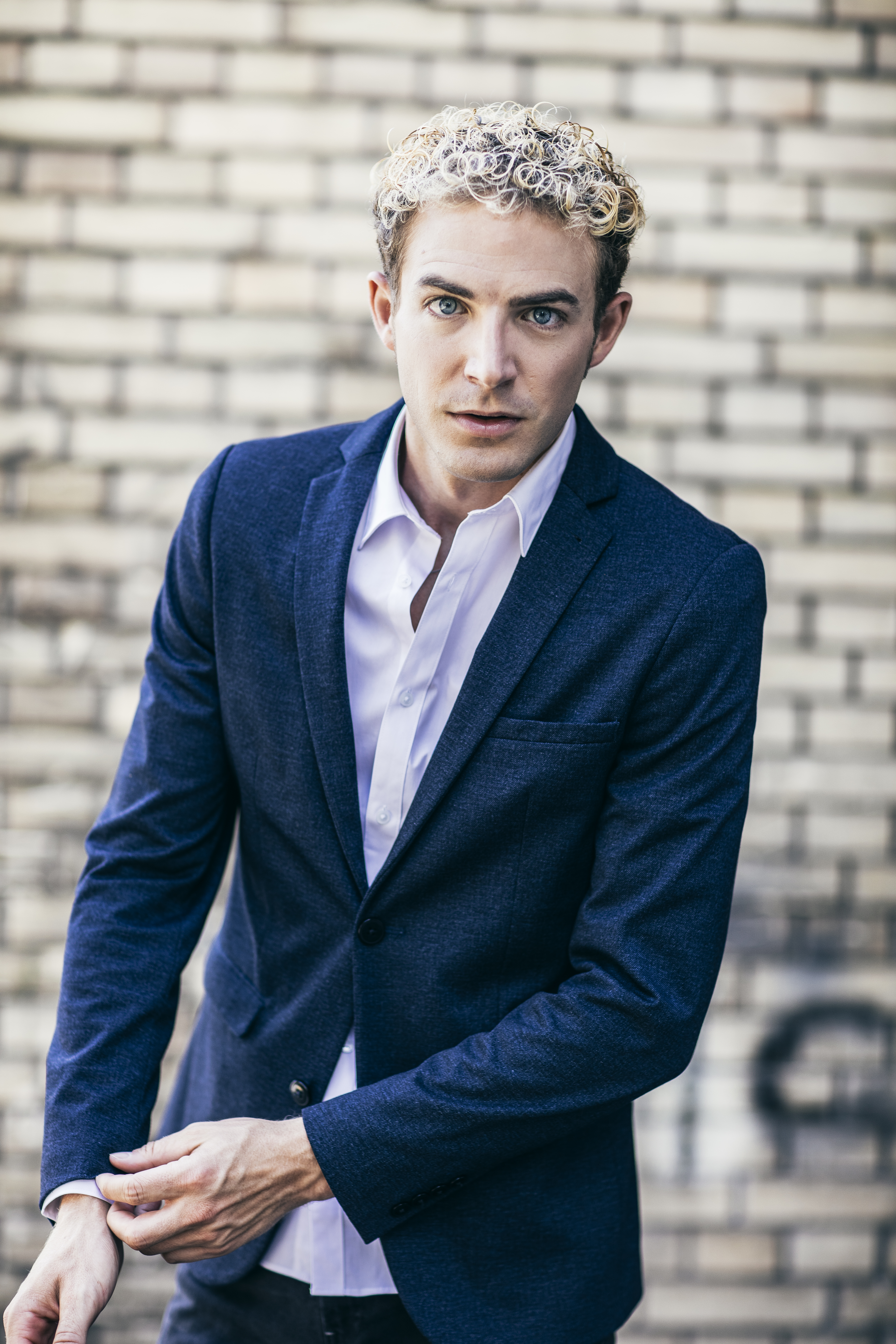 Michael Elsener vor Wand